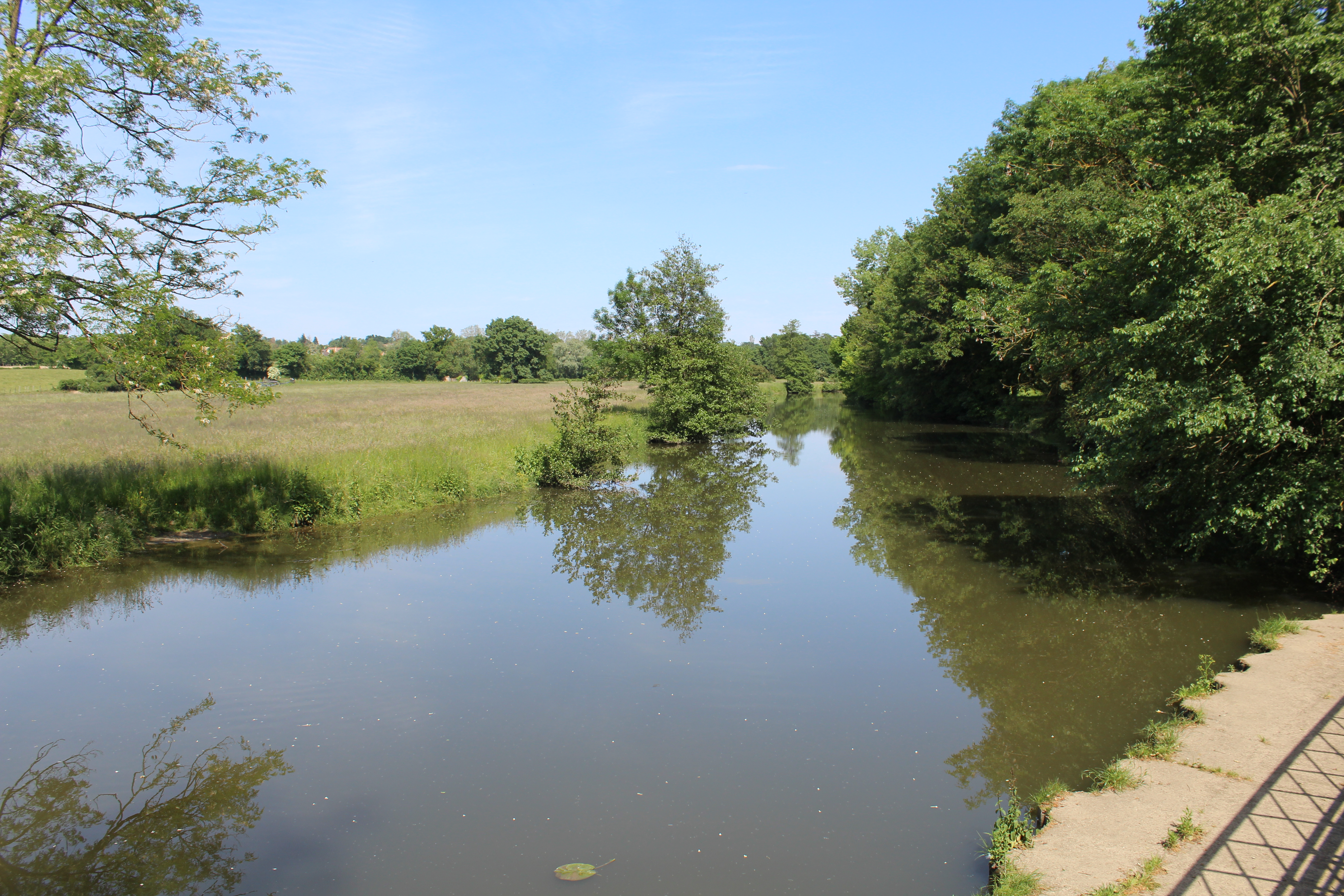 La Veyle dans le parc du château à la frontière entre Pont-de-Veyle et Crottet.